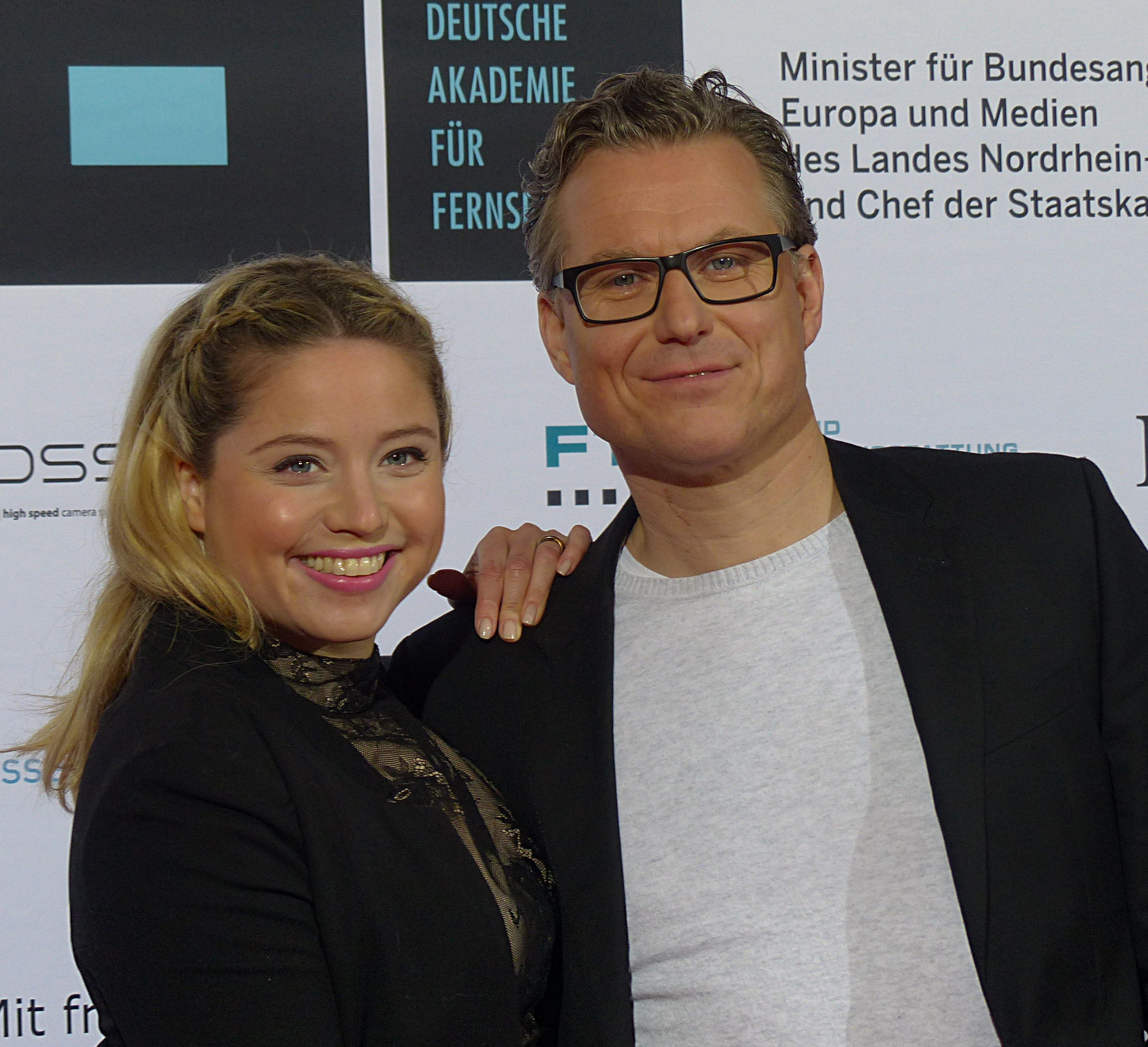 Caroline Maria Frier und Dirk Borchardt bei der Verleihung zur Auszeichnung 2015, durch die Deutsche Akademie für Fernsehen, im November 2015.